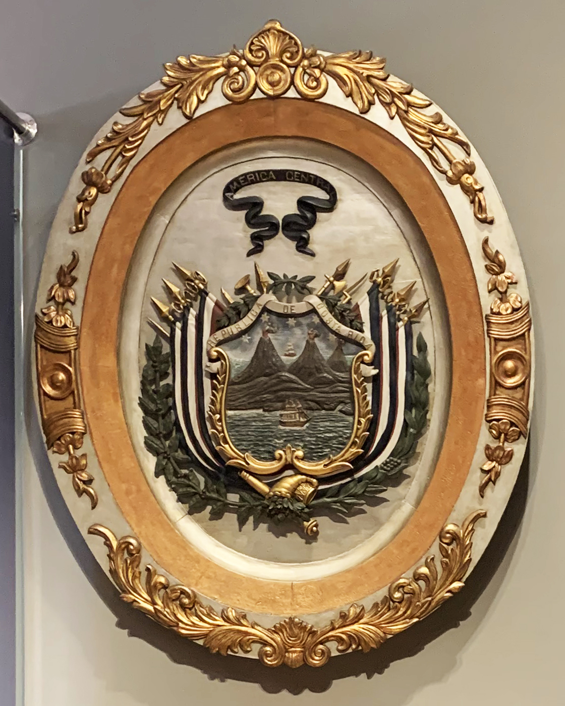 Escudo de armas de Costa Rica adoptado en 1848 con la proclamación de la República y es la base del escudo actual. Museo Nacional de Costa Rica, San José.